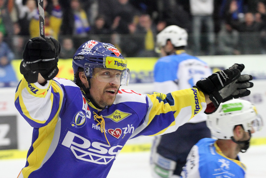 Marek Melenovský při čtvrfinále ELH Zlín-Plzeň v sezoně 2011/2012.